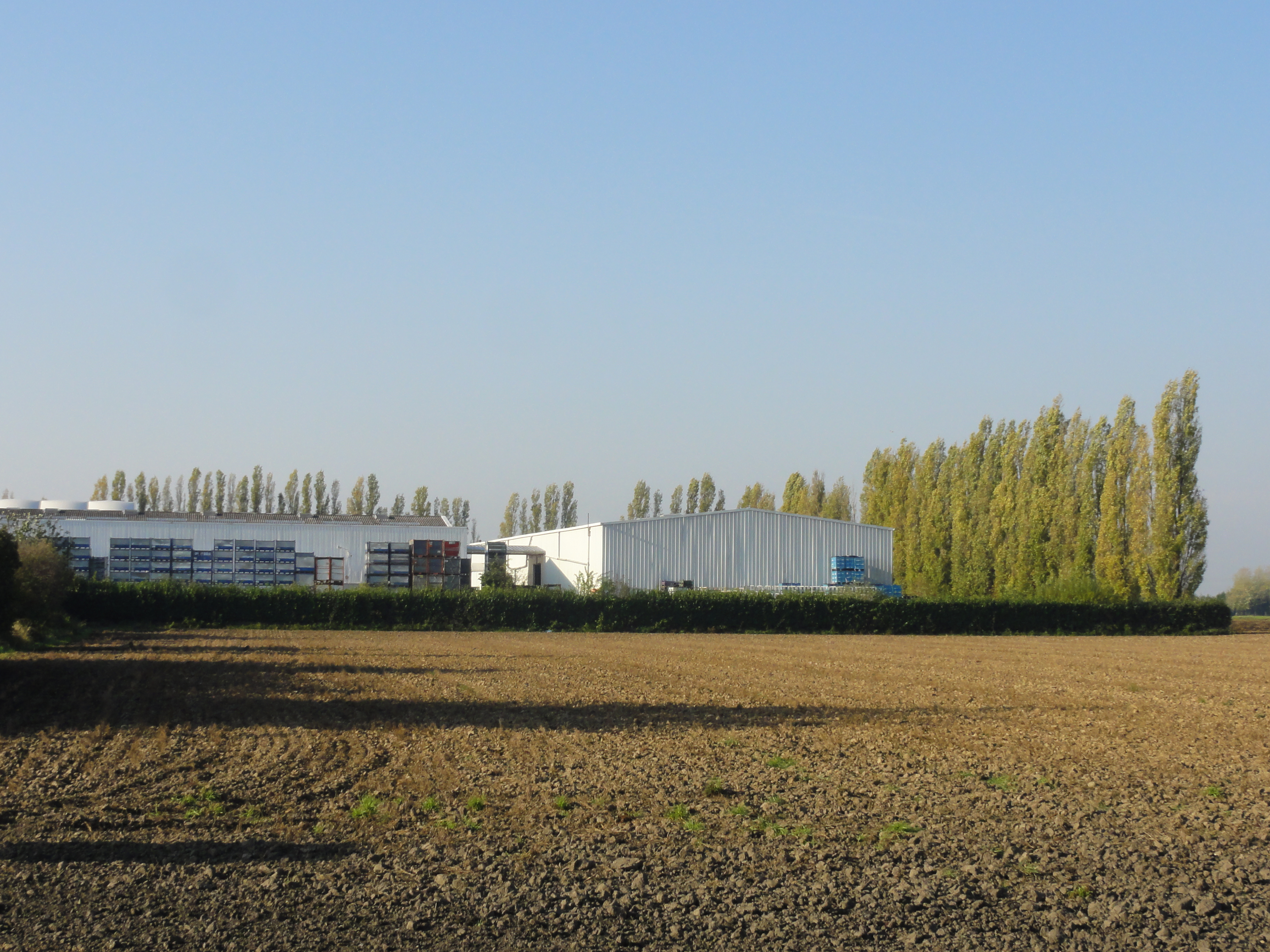 La Fosse n° 1 de la Compagnie des mines de Carvin était un charbonnage constitué d'un seul puits situé à Carvin, Pas-de-Calais, Nord-Pas-de-Calais, France.